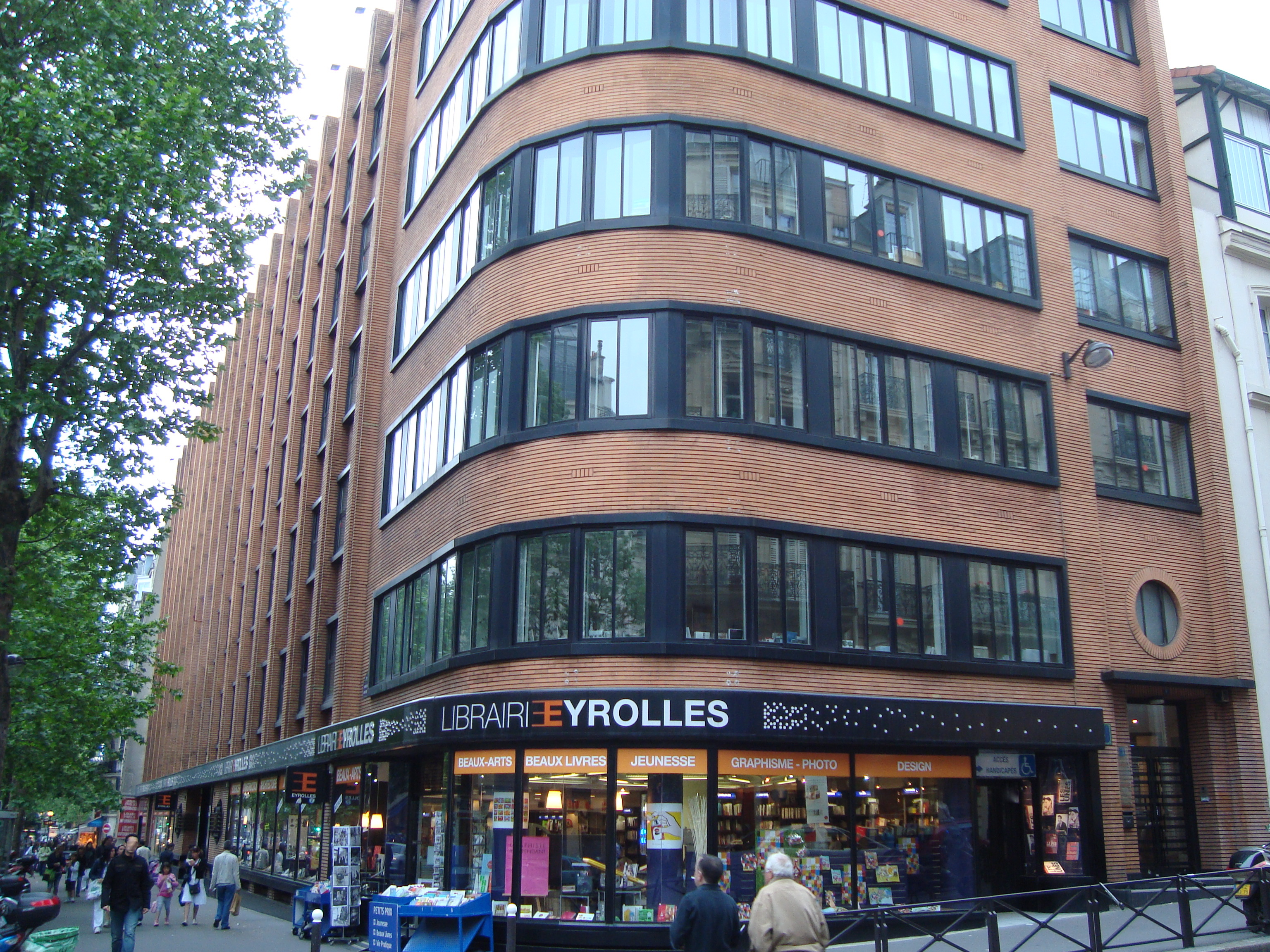 La librairie Eyrolles à l'angle du boulevard Saint-Germain et de la rue Thénard à Paris